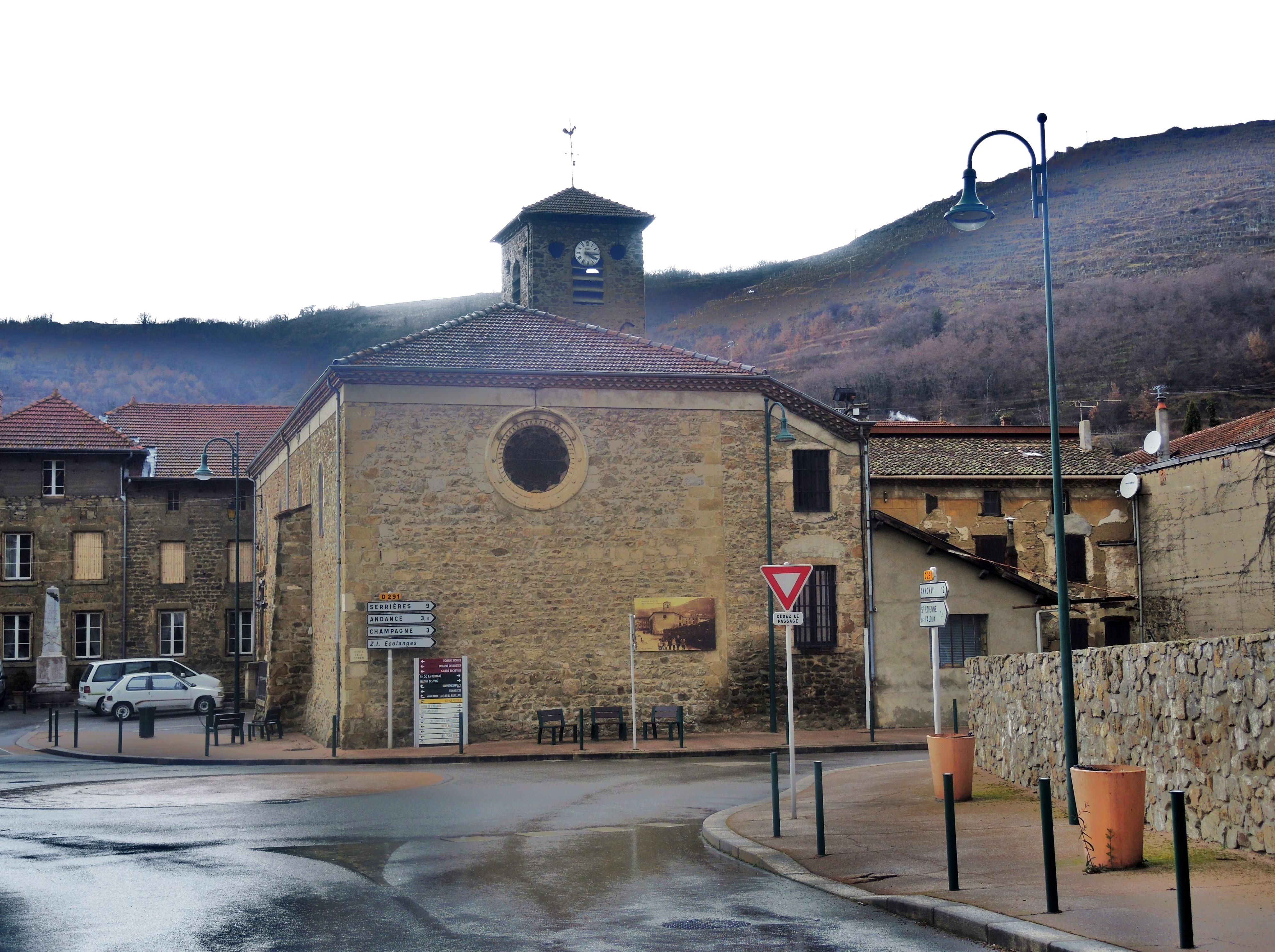 Saint-Désirat détail